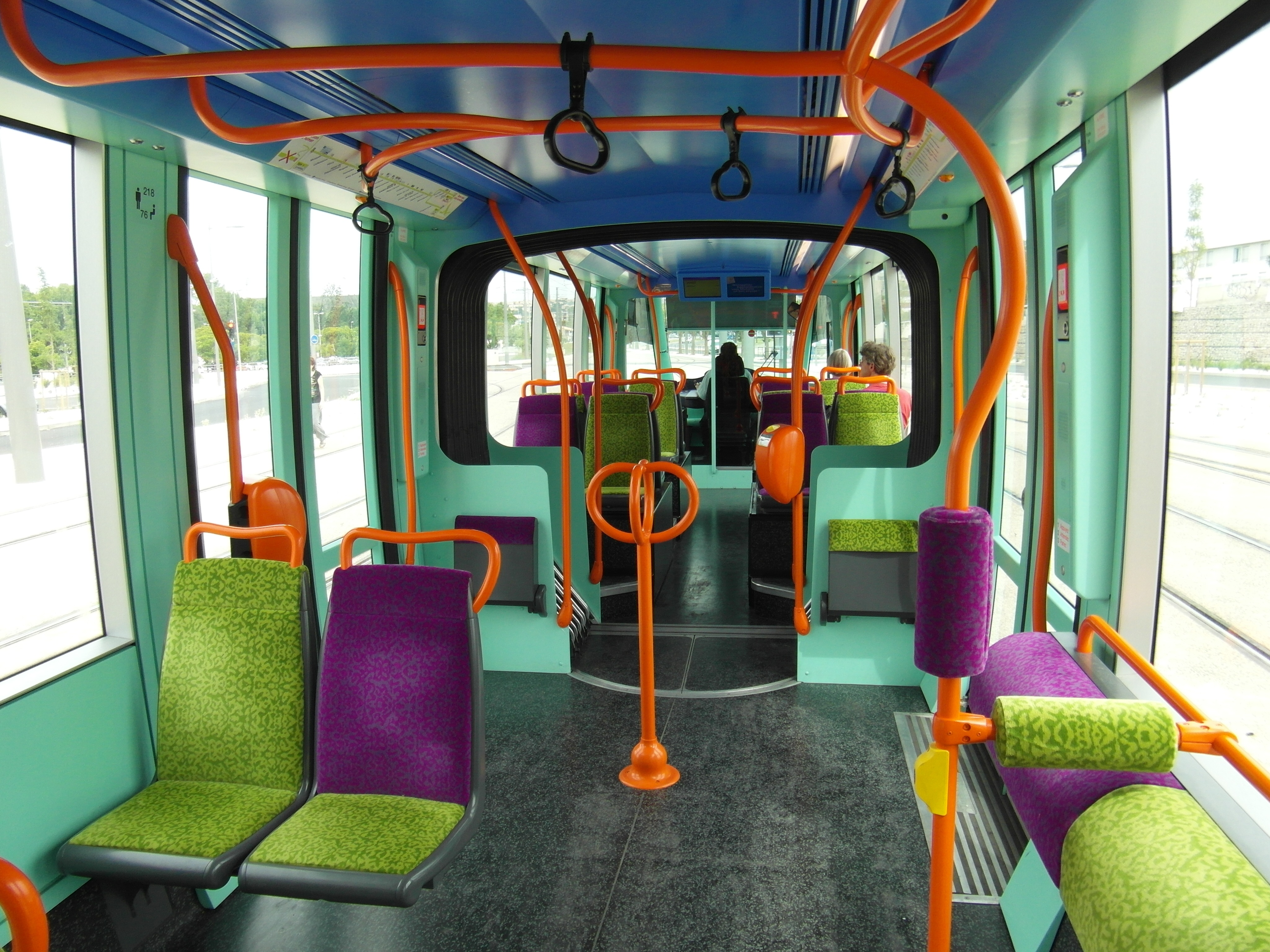 Details der Straßenbahnfahrzeuge der Linie 3